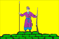 Флаг Березанского сельского поселения, Краснодарский край, Россия.